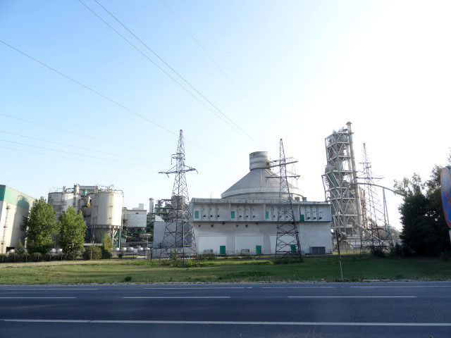 Cementownia Kujawy w Piechcinie k. Barcina, woj. kujawsko-pomorskie - widok z drogi wojewódzkiej nr 251